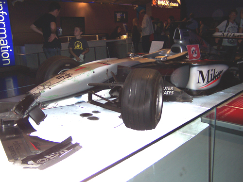 McLaren mp4-14 del 1999 usata da Hakkinen nel Gp di Germania del 1999. La vettura è presente al museo delle scienze di Londra, nel reparto mezzi di trasporto, come esempio di vettura più sicura al mondo in quanto con essa Hakkinen è uscito di pista a quasi 300 Km/h (a causa della foratura del pneumatico posteriore sinistro)urtando le barriere di protezione senza riportare conseguenze.